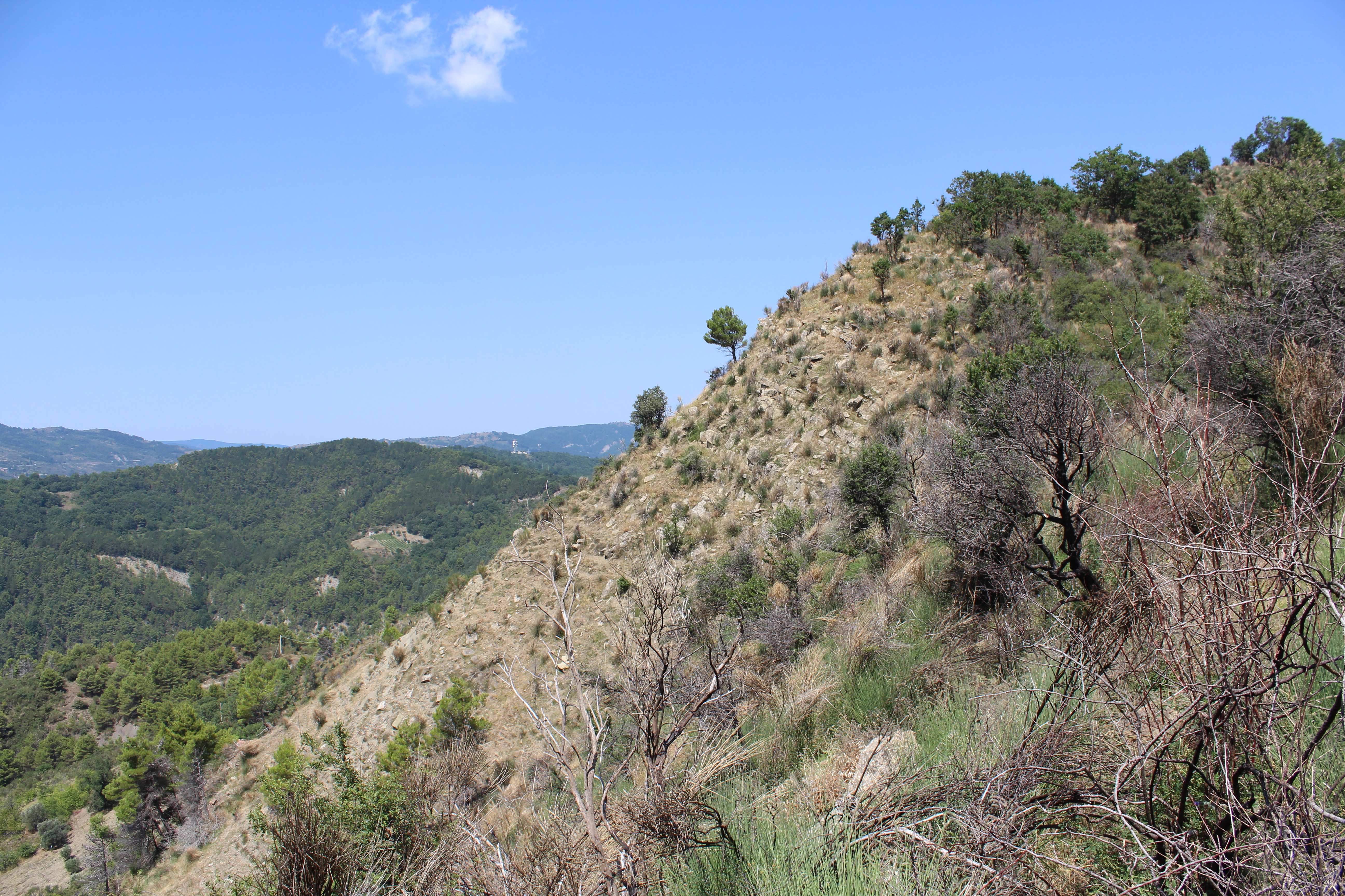 Timpone del Cerro